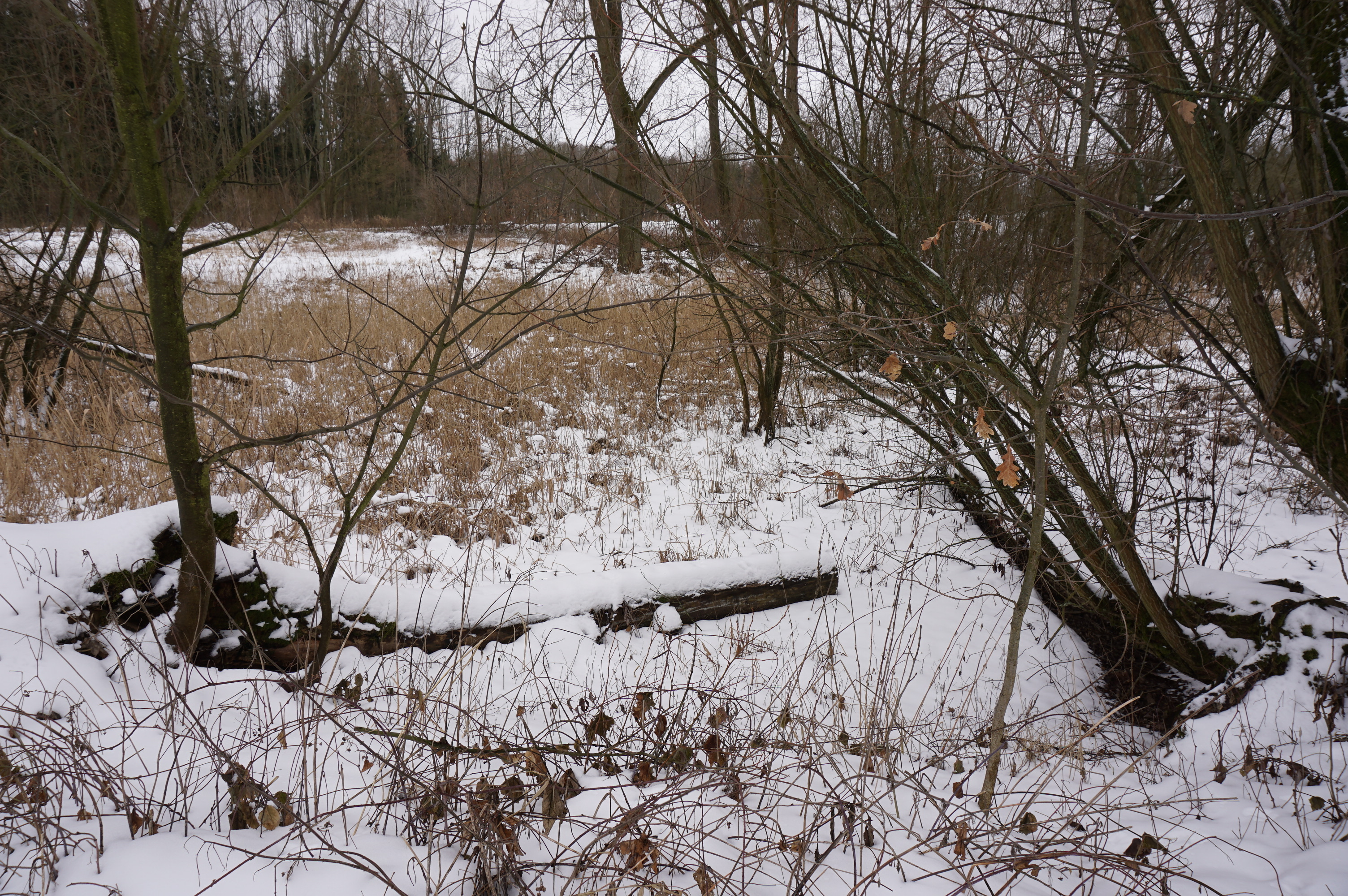 PP Pod Rýzmburkem (zima 2019)